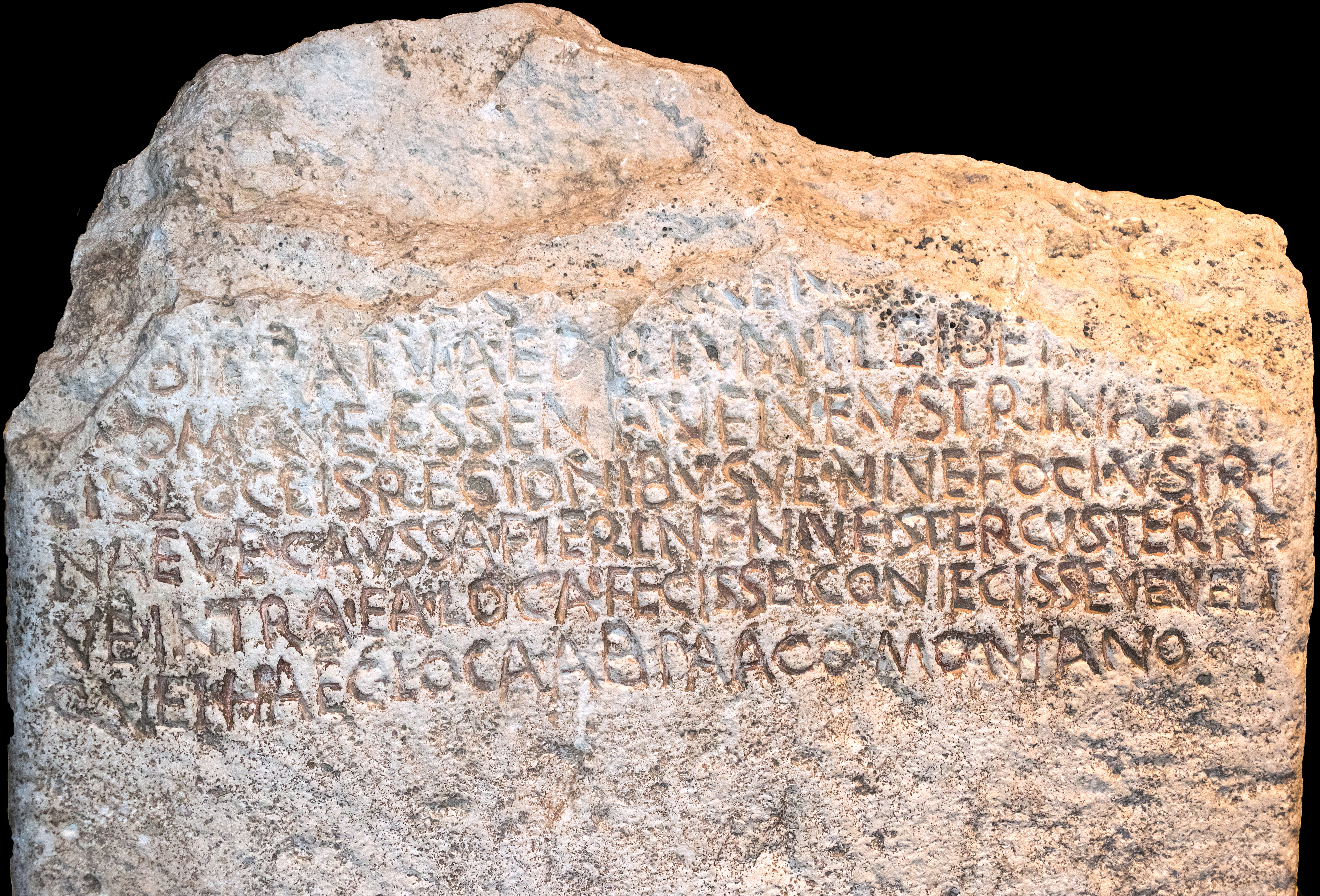 Ein Senatskonsult (SC) aus der zweiten Hälfte des 2. Jahrhundert v. Chr., der es jedem untersagte, Kadaver zu verbrennen oder zu vergraben sowie Müll als auch Bauschutt innerhalb des durch die Grenzsteine definierten Gebietes zu entsorgen. Die Verordnung wurde von plebejischen Aedilen überwacht und durchgesetzt. Die moderne Forschung nimmt an, dass der aufgeführte Bezirk Pagus Montanus sich auf das Gebiet unmittelbar vor dem Esquilintor bezieht, nahe dem Heiligtum der Venus Libitina. CIL VI 3823 = CIL VI 31577 = CIL I 591 = AE 1993, 111 = AE 1998, 24